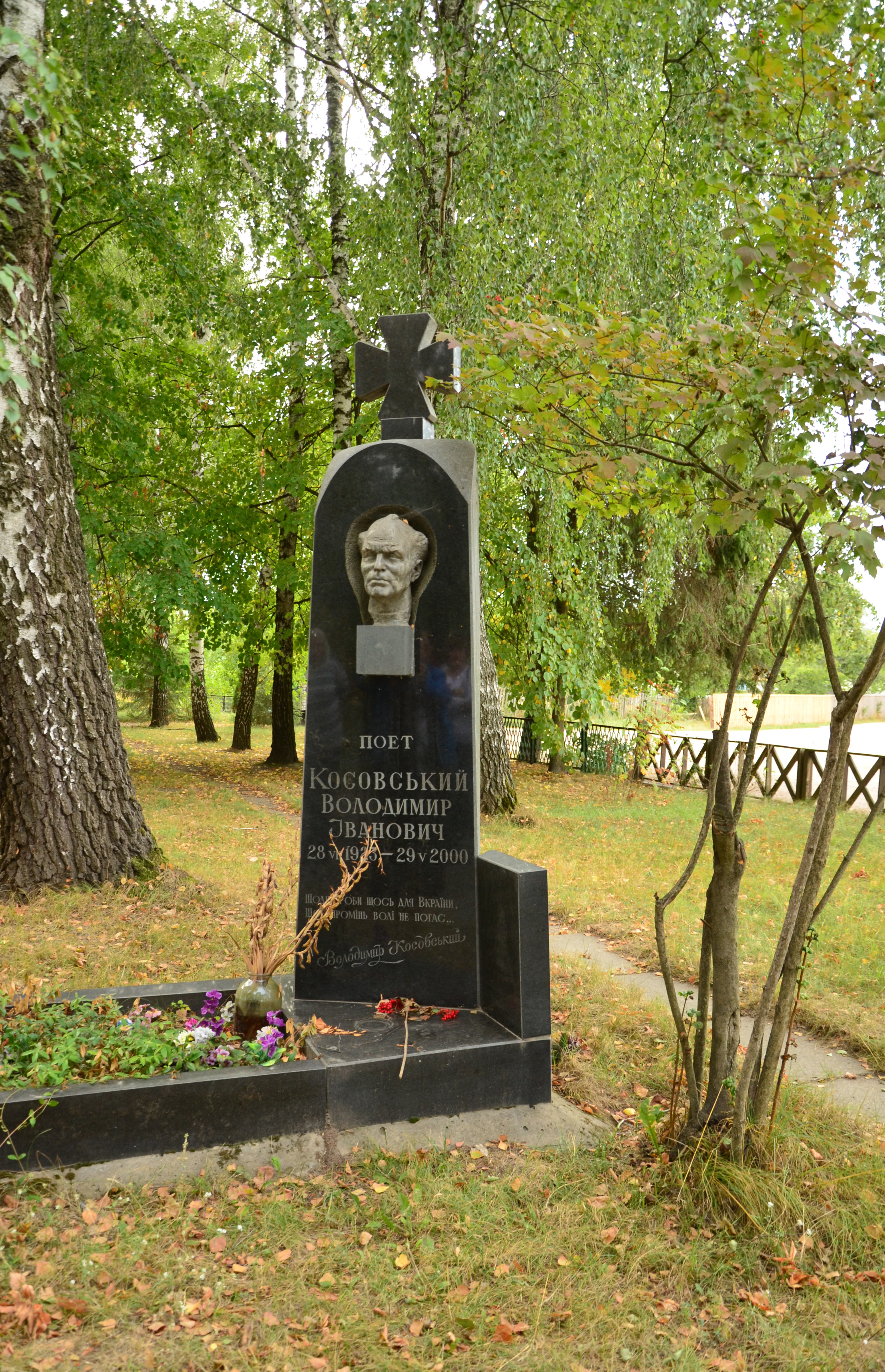 Пам'ятник поету В. І. Косовському, село Веприк, біля церкви